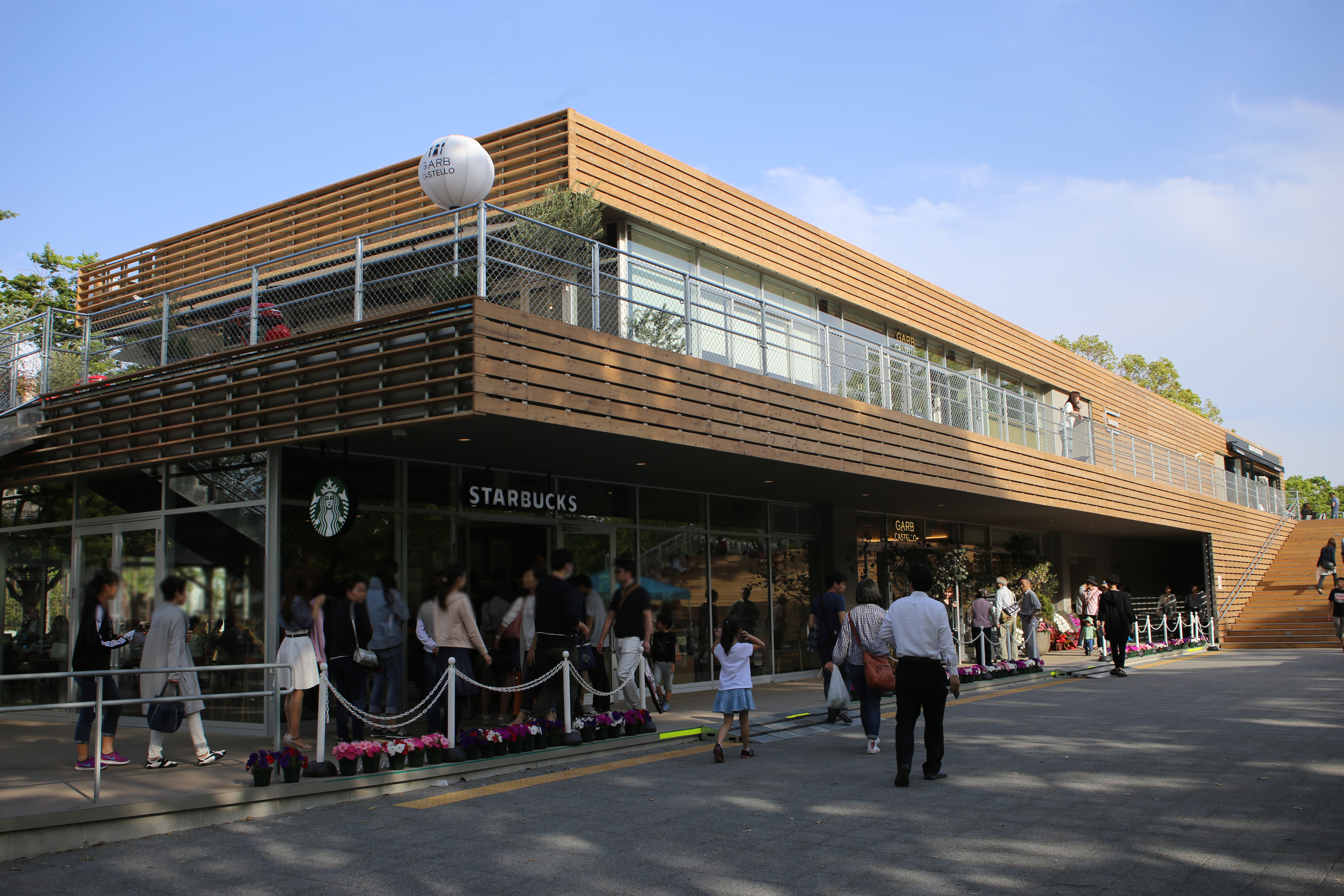 名古屋市北区名城の名城公園内のtonarino